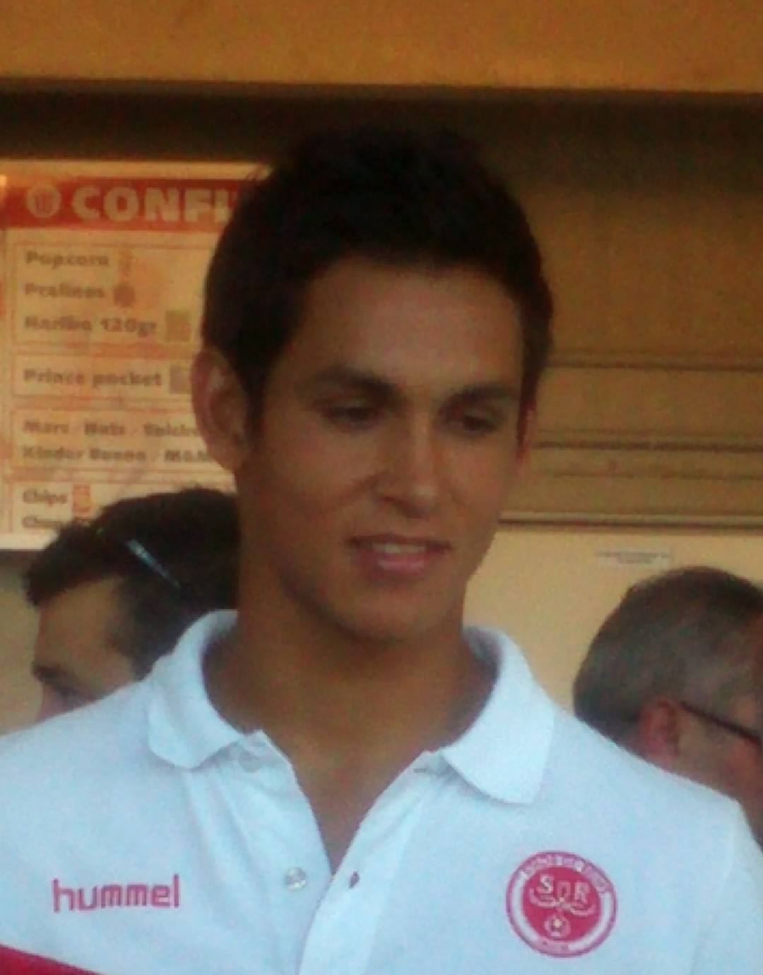 Aissa Mandi lors de la présentation de l'effectif du Stade de Reims.